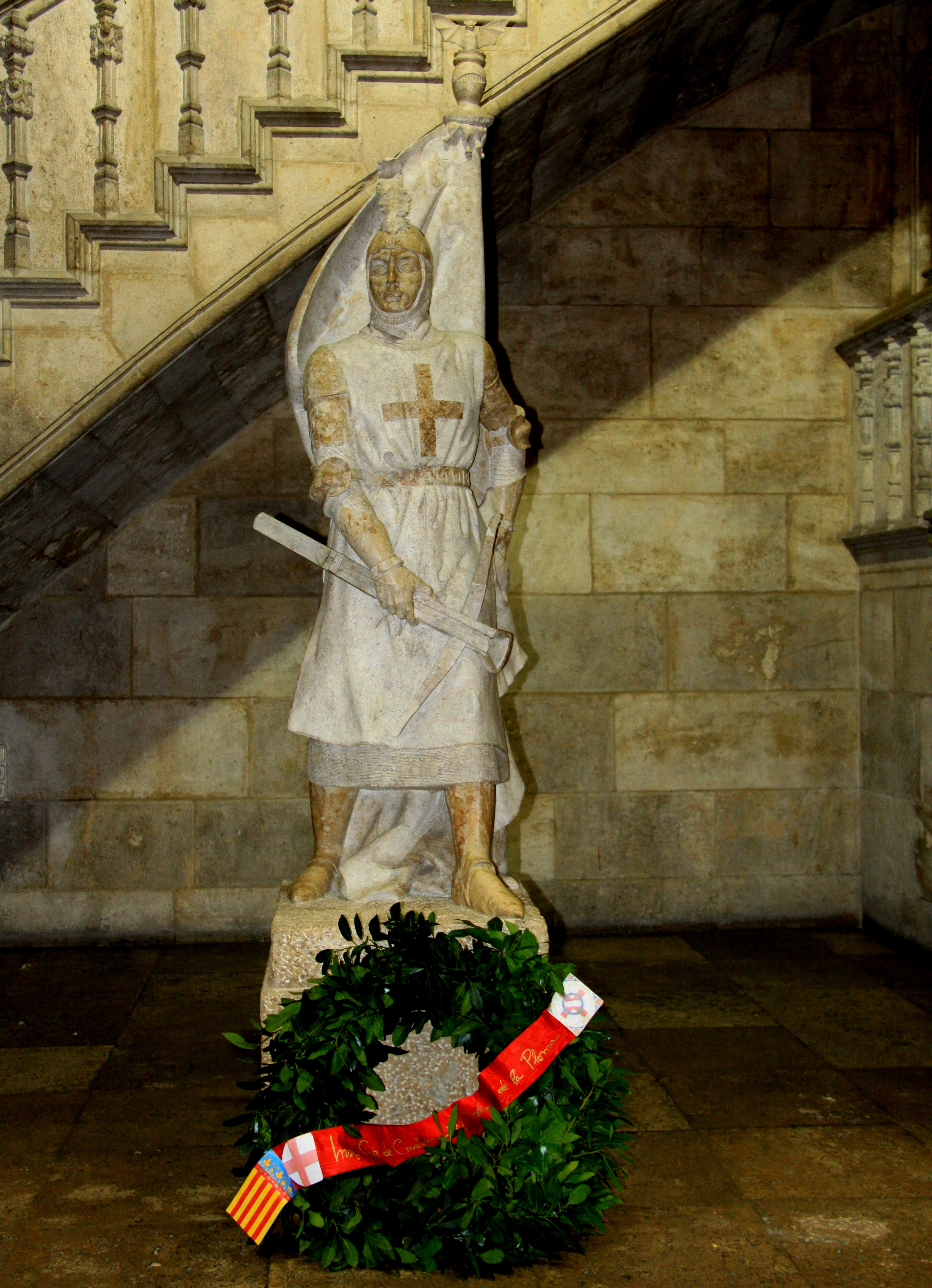 Estatua del Ballester del Centenar de la Ploma realizada por Don Salvador Furió i Carbonell